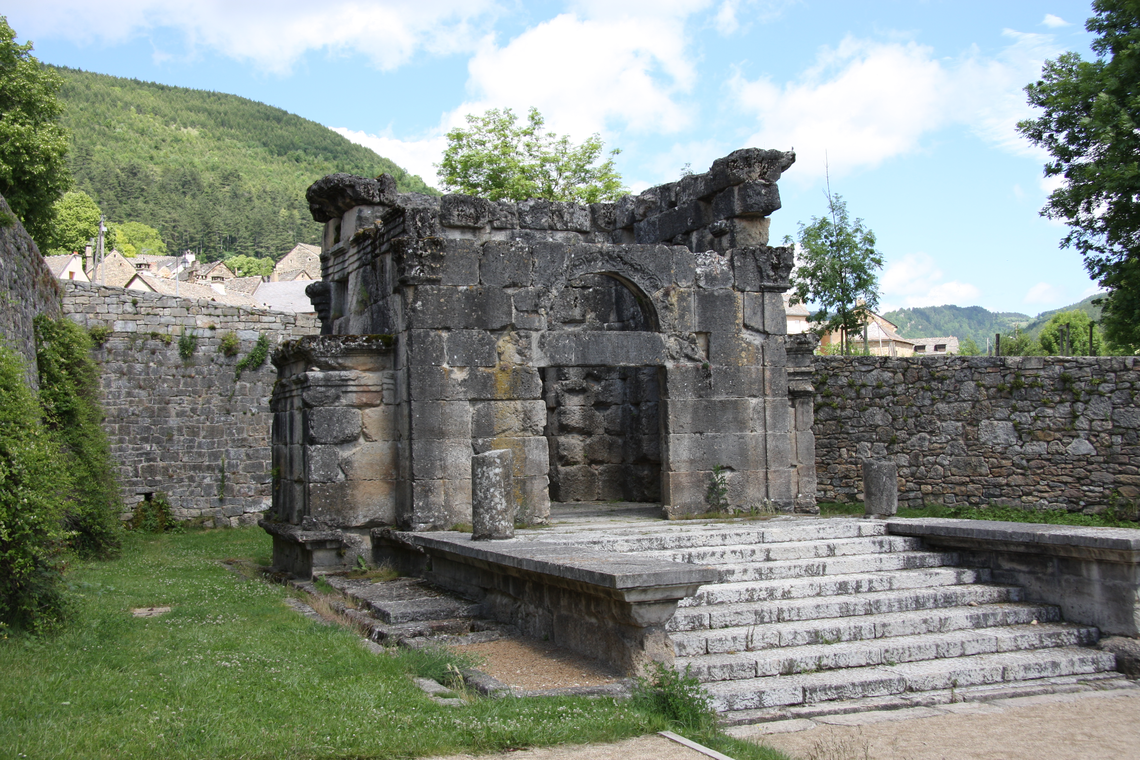 Mausolée gallo-romain de Lanuéjols en Lozère (France)